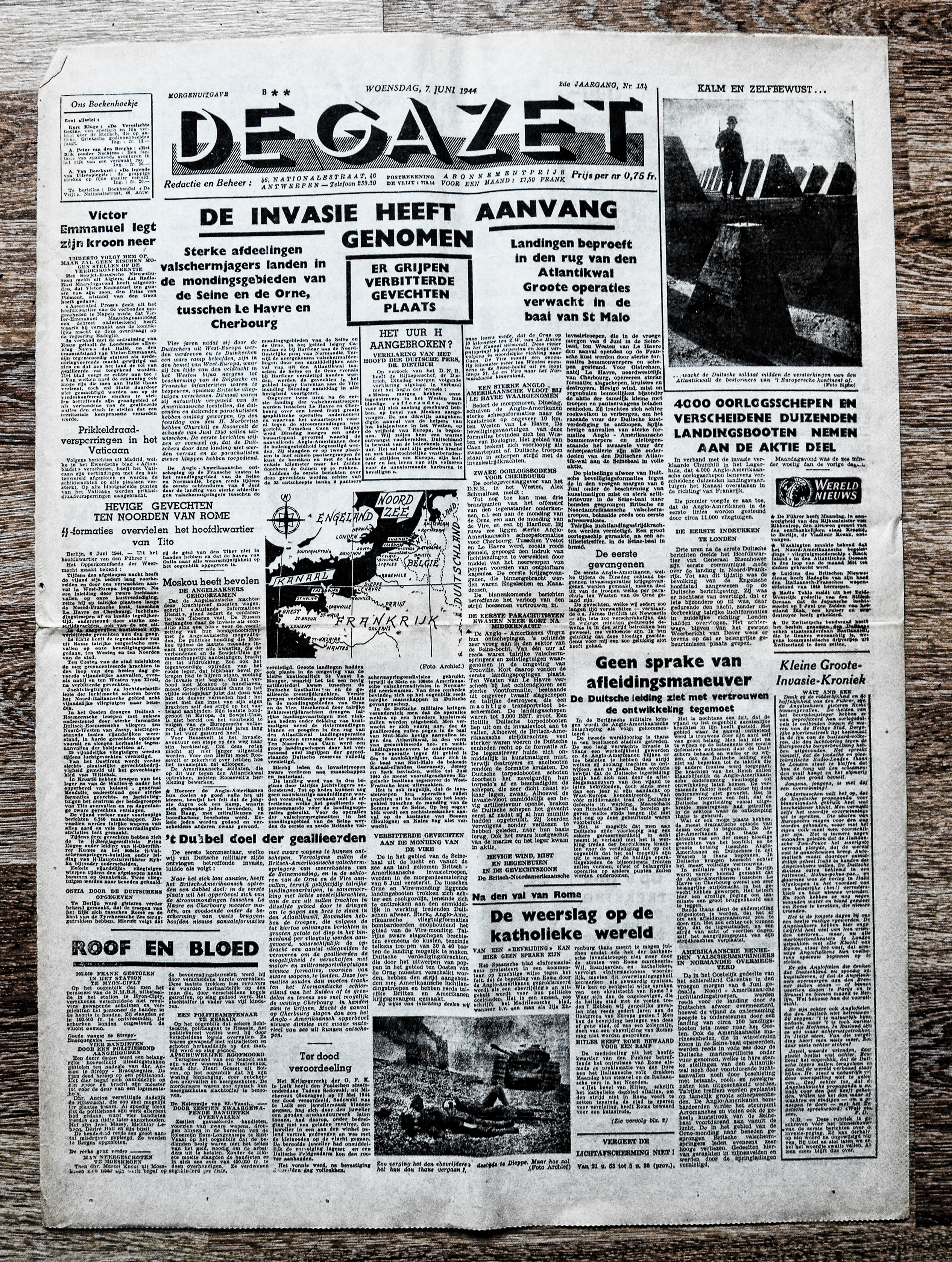 Voorpagina "De Gazet" 7 Juni 1944 met hoofdnieuws "de Invasie heeft aanvang genomen' verwijzend naar de geallieerde landing in Normandië